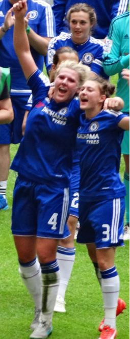 Millie Bright et Hanna Blundell célèbrent leur victoire contre les Notts County Ladies